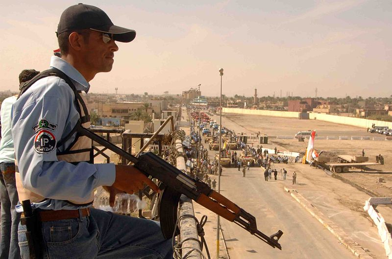 شرطة الأنبار Licensing تصنيف:صور الرمادي